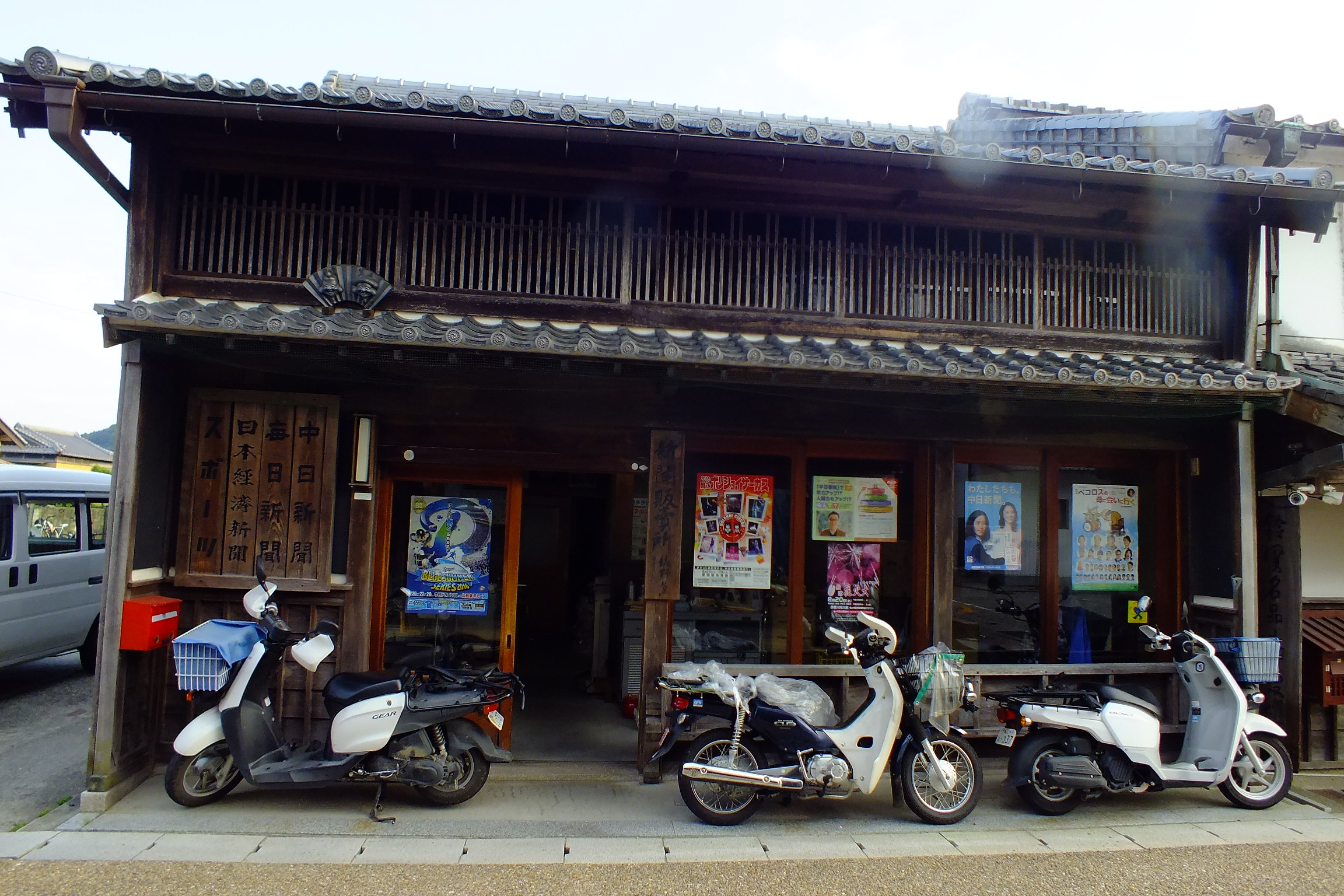 2016-08-05 Tokaido Seki Juku Kameyama City Mie,東海道五十三次 関宿